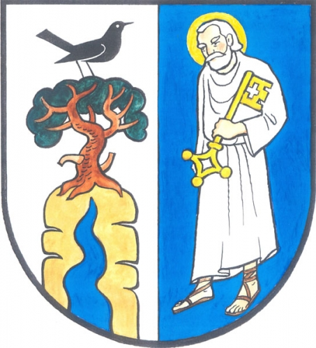 znak, Chvaleč, okres Trutnov